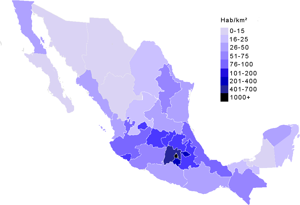 Map of Mexico, Mapa de Mexico, se muestra la densidad de población